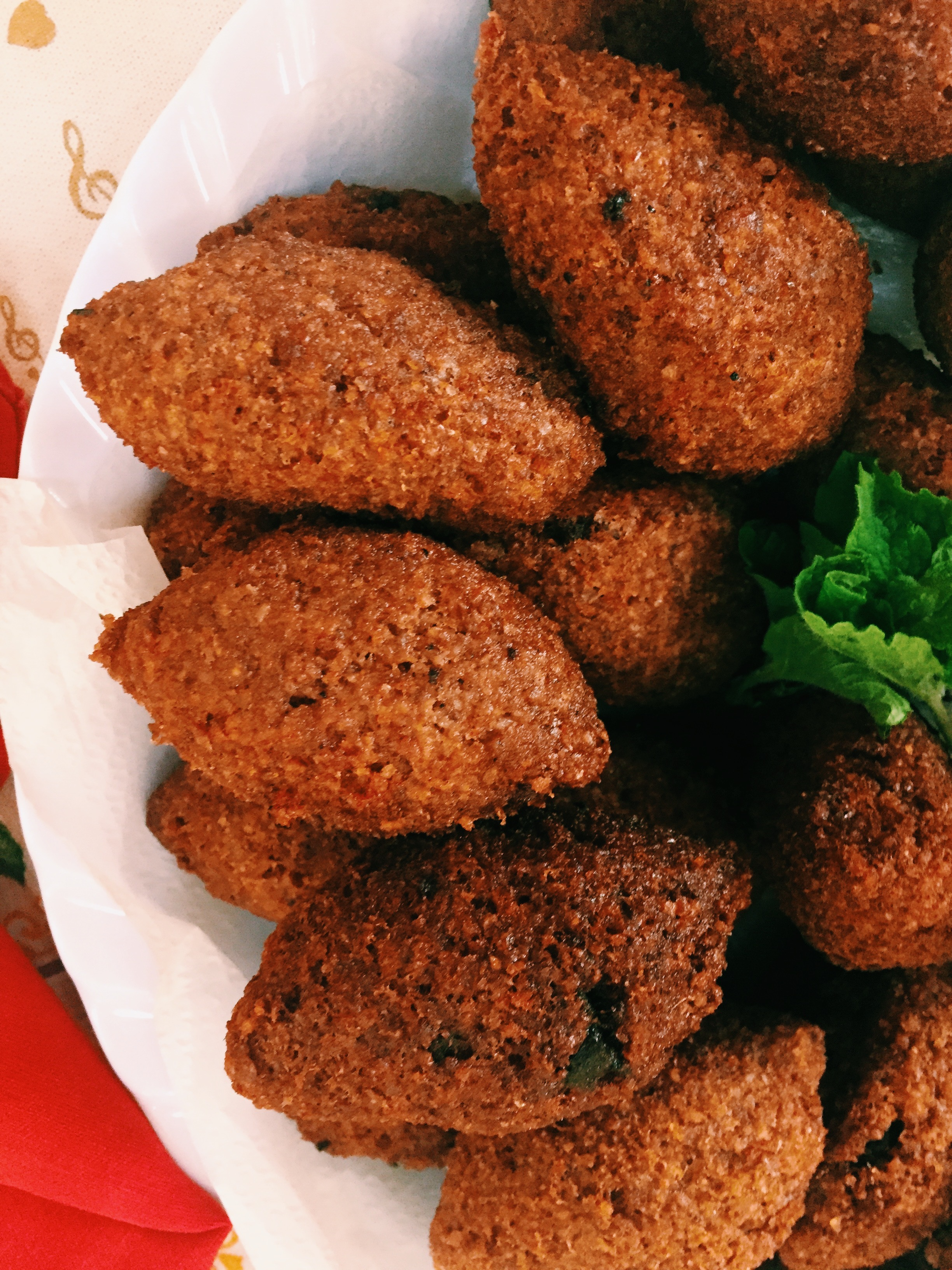 كبة مقلية في البرازيل